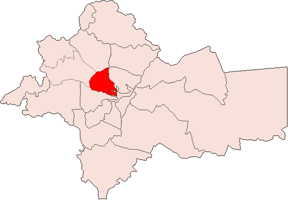 AMMAN-Al Abdali.png — Maps of Amman User:Tarawneh/rami